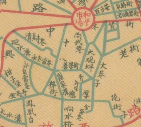 粵語: 十八梯地圖